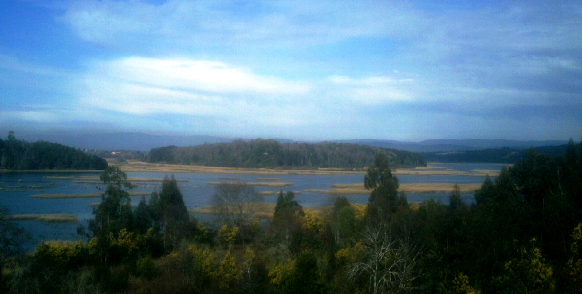 Vista del río Cruces y la isla Teja, Valdivia (Chile. A la izquierda se ve el nacimiento del río Caucau.